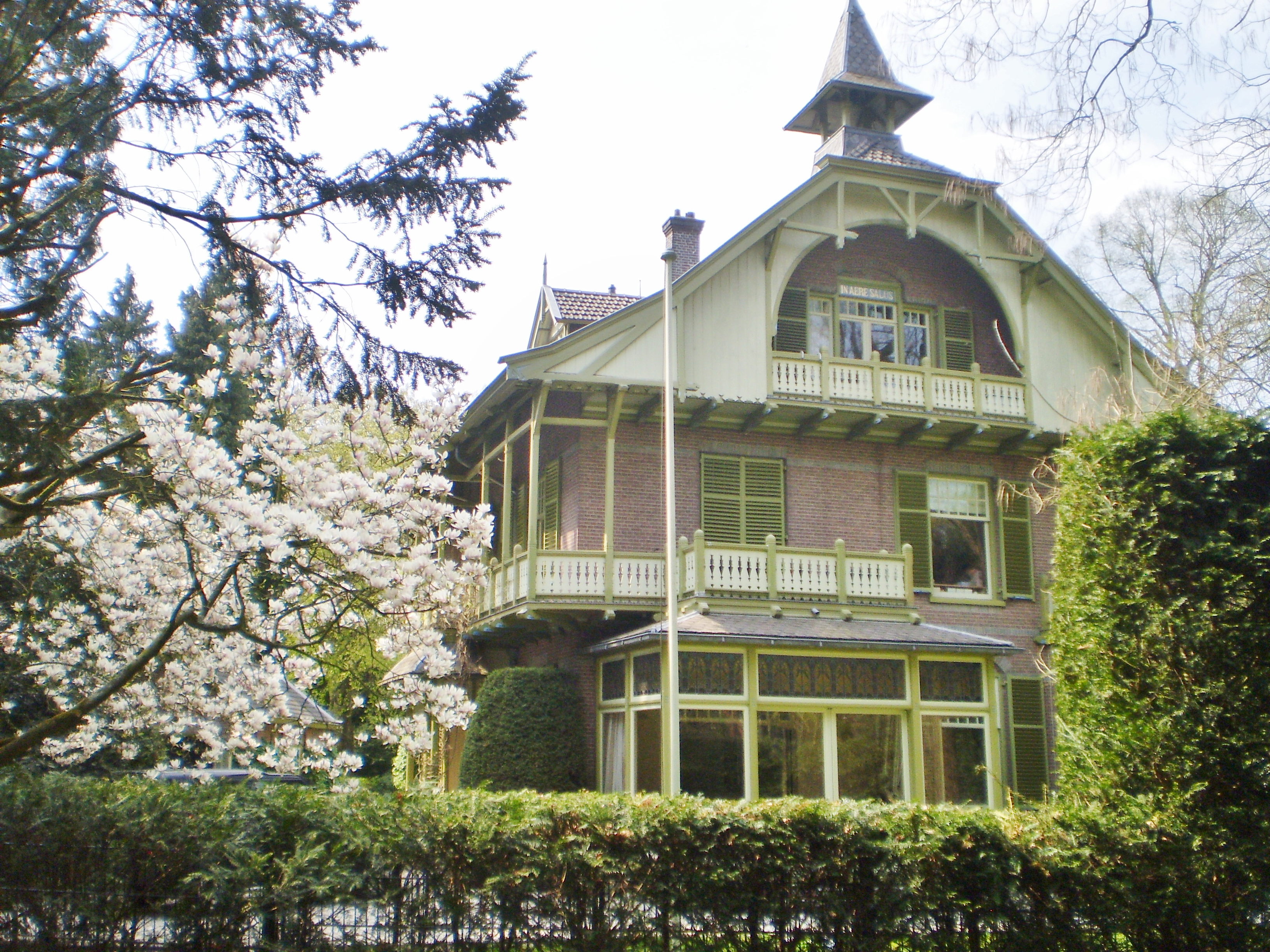 Vanaf de straat genomen